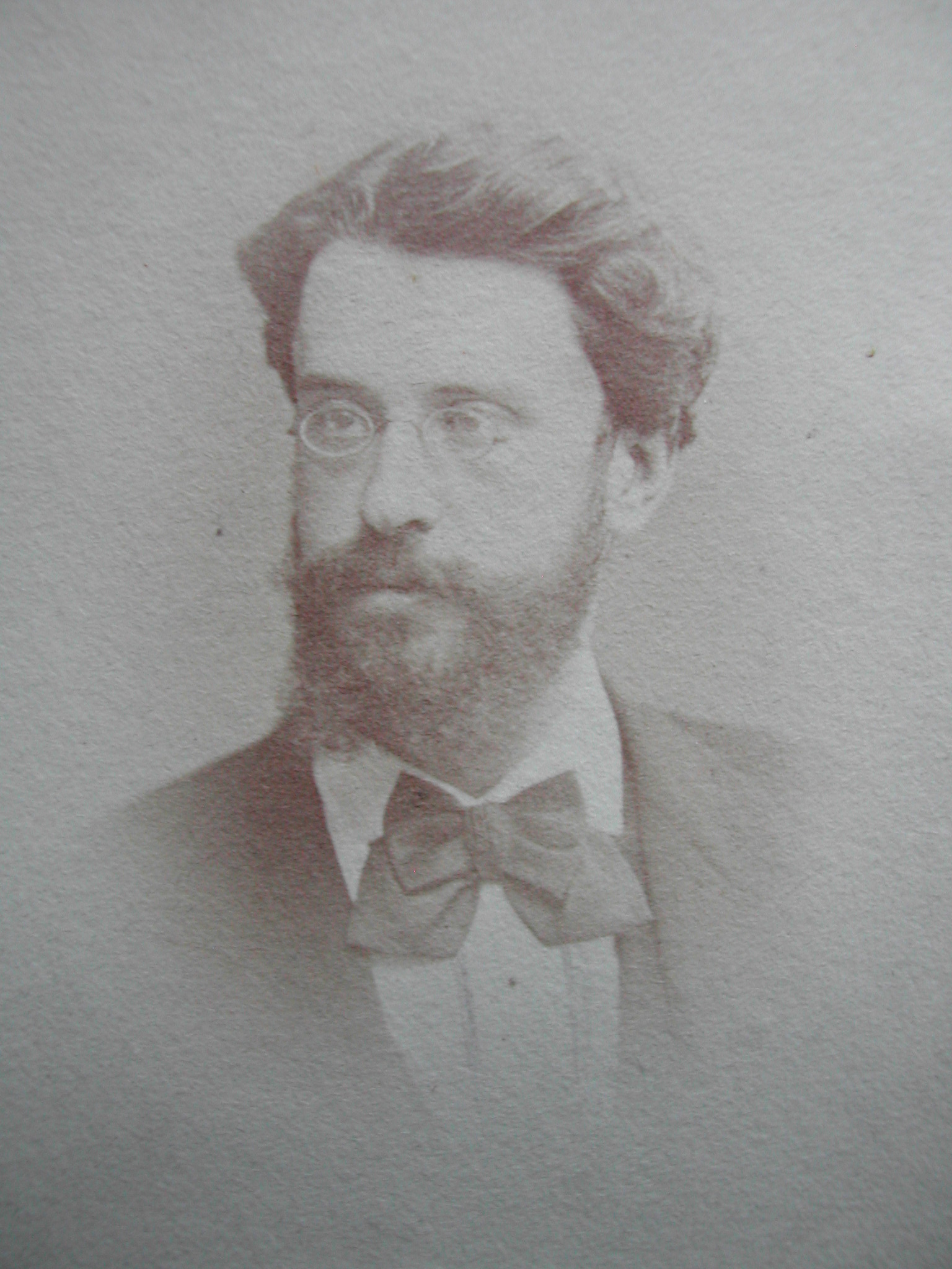 Der französische Althistoriker Auguste Bouché-Leclercq (1842-1923)